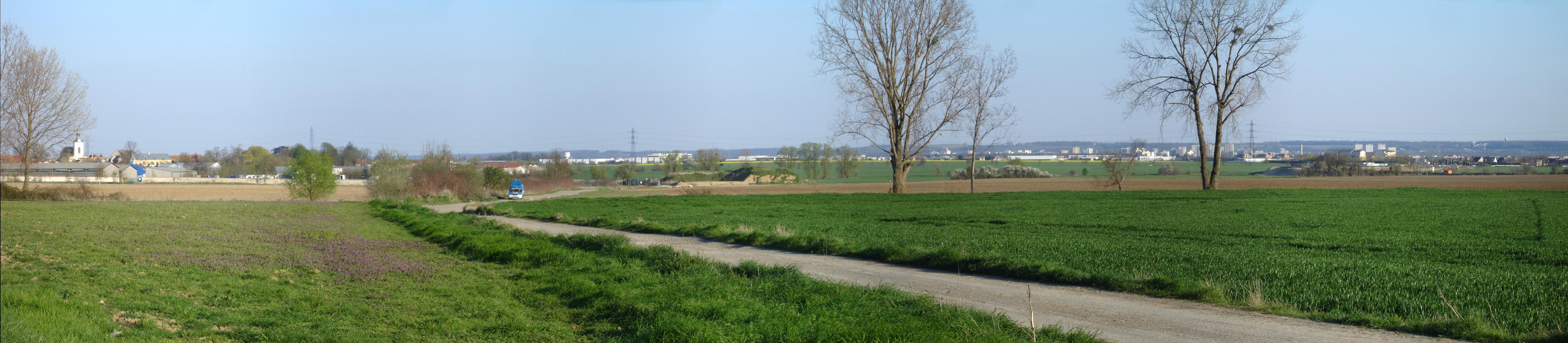 Vue panoramique de Tremblay-en-France (Seine-Saint-Denis), France - Avril 2007 A gauche, le Vieux-Pays entouré de champs cultivés, à droite au fond, la ville moderne, le long du canal de l'Ourcq au pied de la forêt de Bondy. Photo personnelle (own work) de Clicsouris